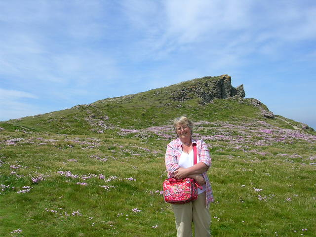 Carla Vermaat